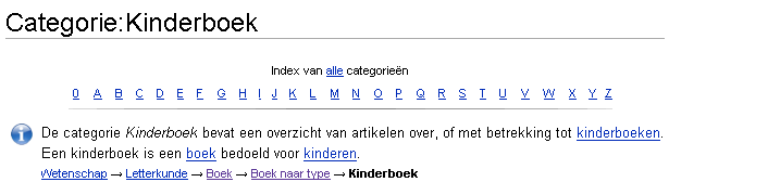 Broodkruimelnavigatie op de Nederlandse Wikipedia anno vandaag.